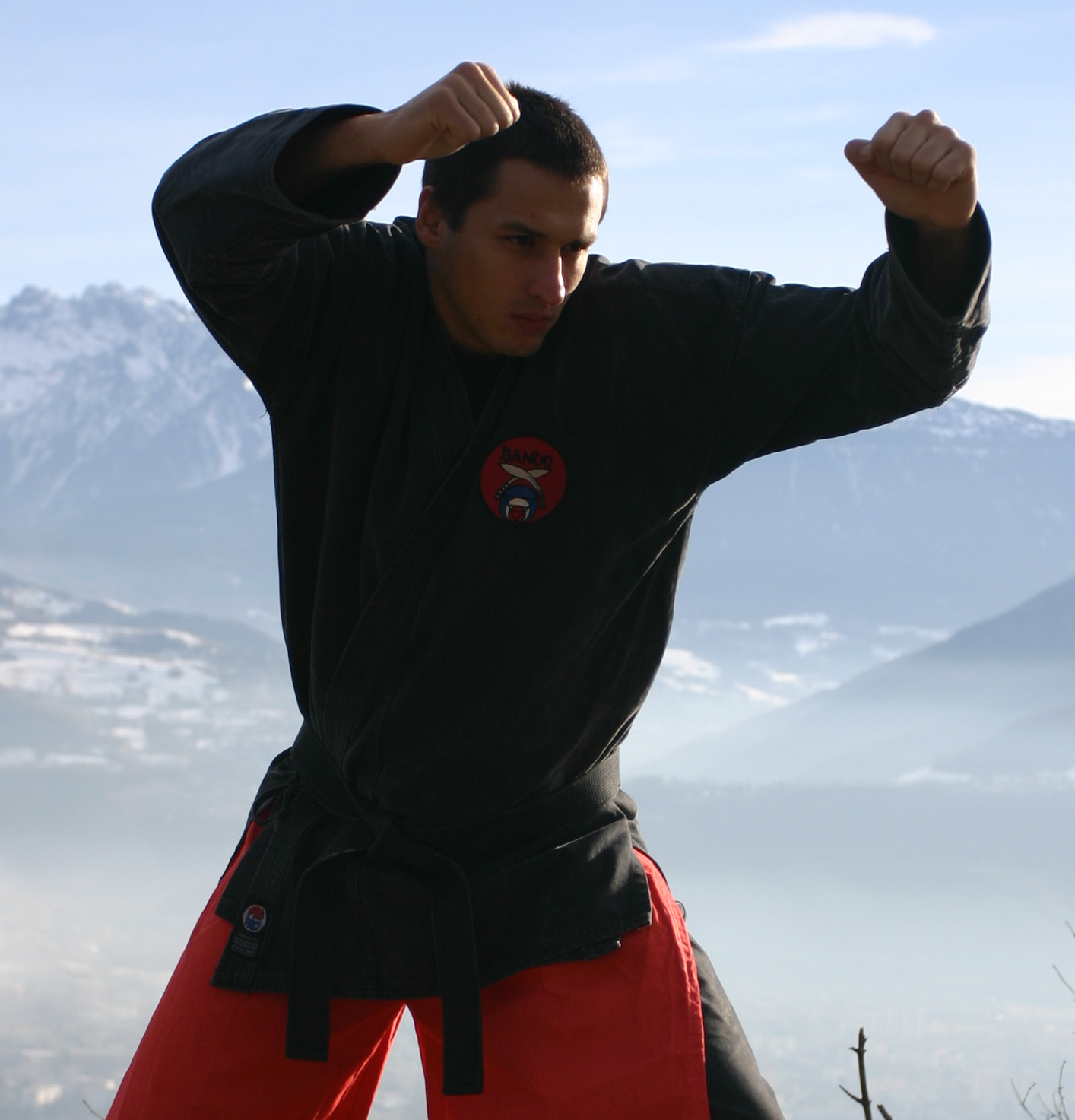 jmg_buffle.jpg